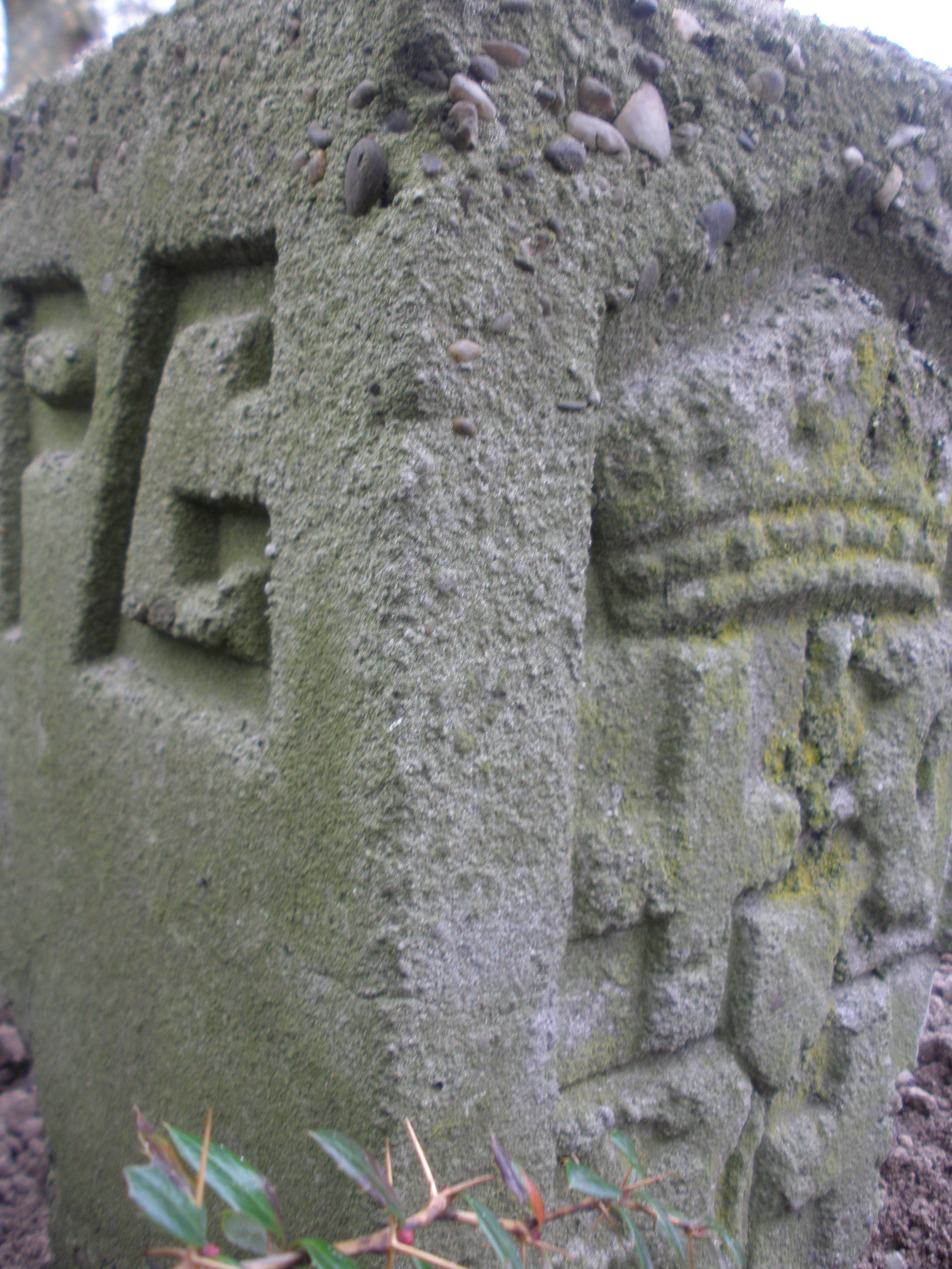 Een zogenaamde Mussertpaal aan de N228 in Montfoort in de bocht ter hoogte van de kruising met de Boslaan. Er staan twee van deze palen in de bocht. Deze markering is langs doorgaande wegen in de provincie Utrecht aangebracht op initiatief van Anton A. Mussert. Hij werkte van 1920 tot 1934 als ingenieur bij de Provinciale Waterstaat Utrecht. Op de achterkant van de grenspalen staan de initialen PG, voor Provinciale Grond. Het betreft een grensaanduiding tussen het Provinciale eigendom van de weg en particuliere grond.